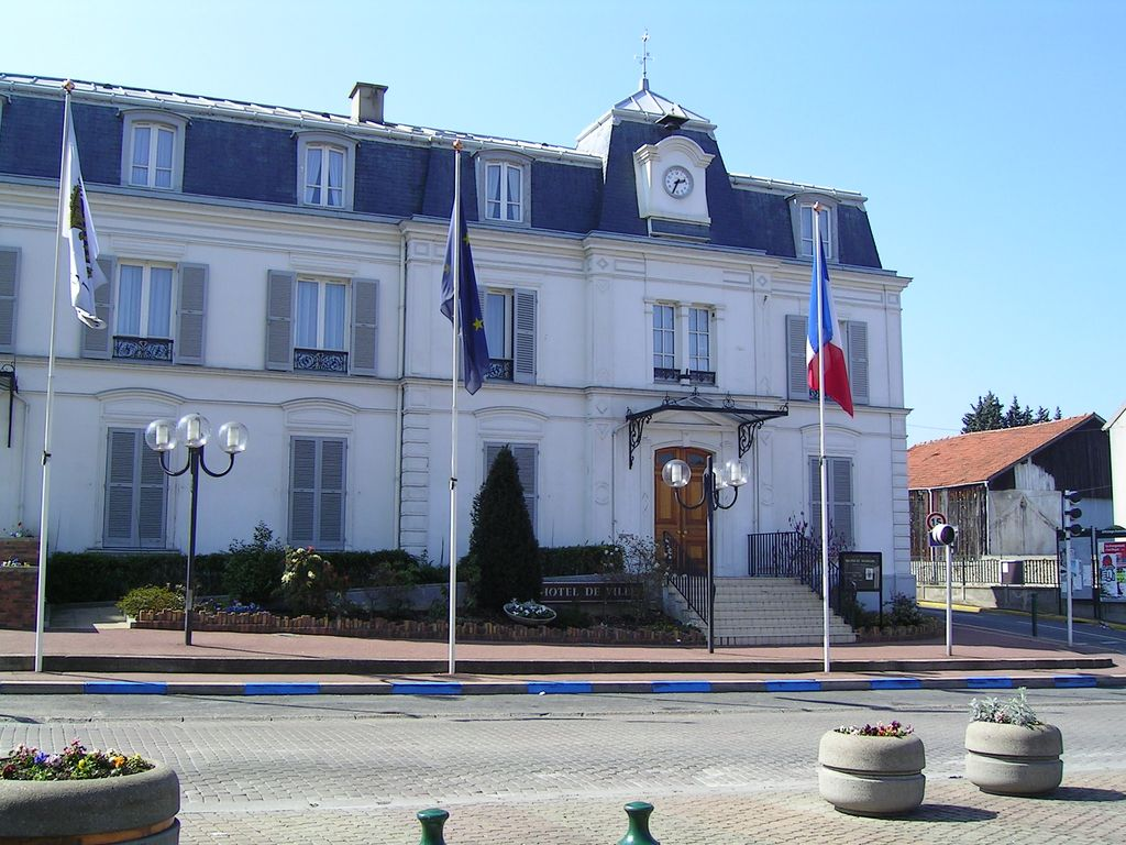 Hôtel de ville, rue Alexandre Boucher Photo personnelle (own work) de Marianna